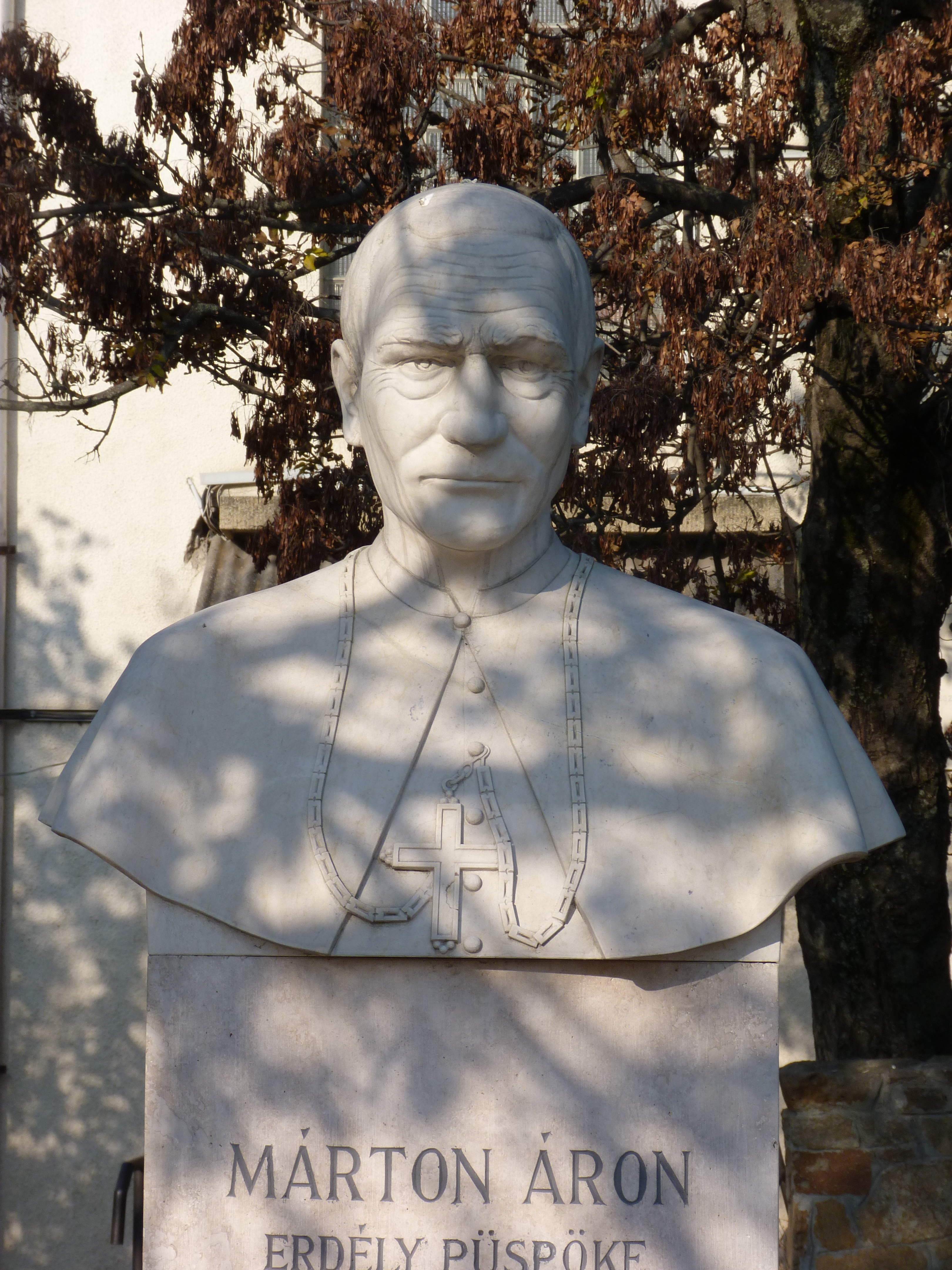 A felvétel 2015. október 31-én készült. Márton Áron tér, Márton Áron szobra. Budapest.